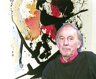 Portrait de Jean Miotte